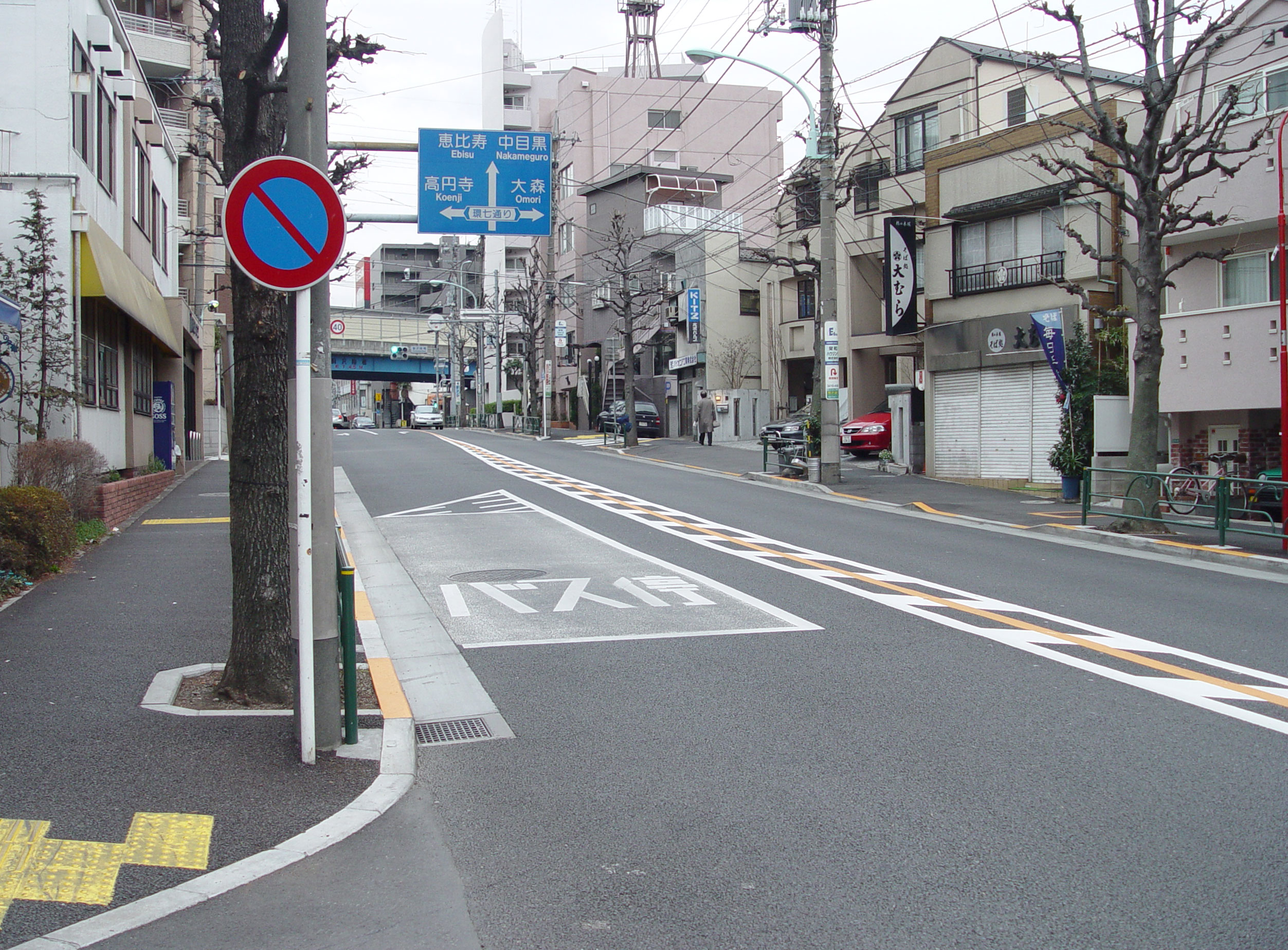 Komazawa Street in Kakinokizaka, Meguro, Tokyo, Japan目黒区柿の木坂を貫く駒沢通り、背景に環七通り